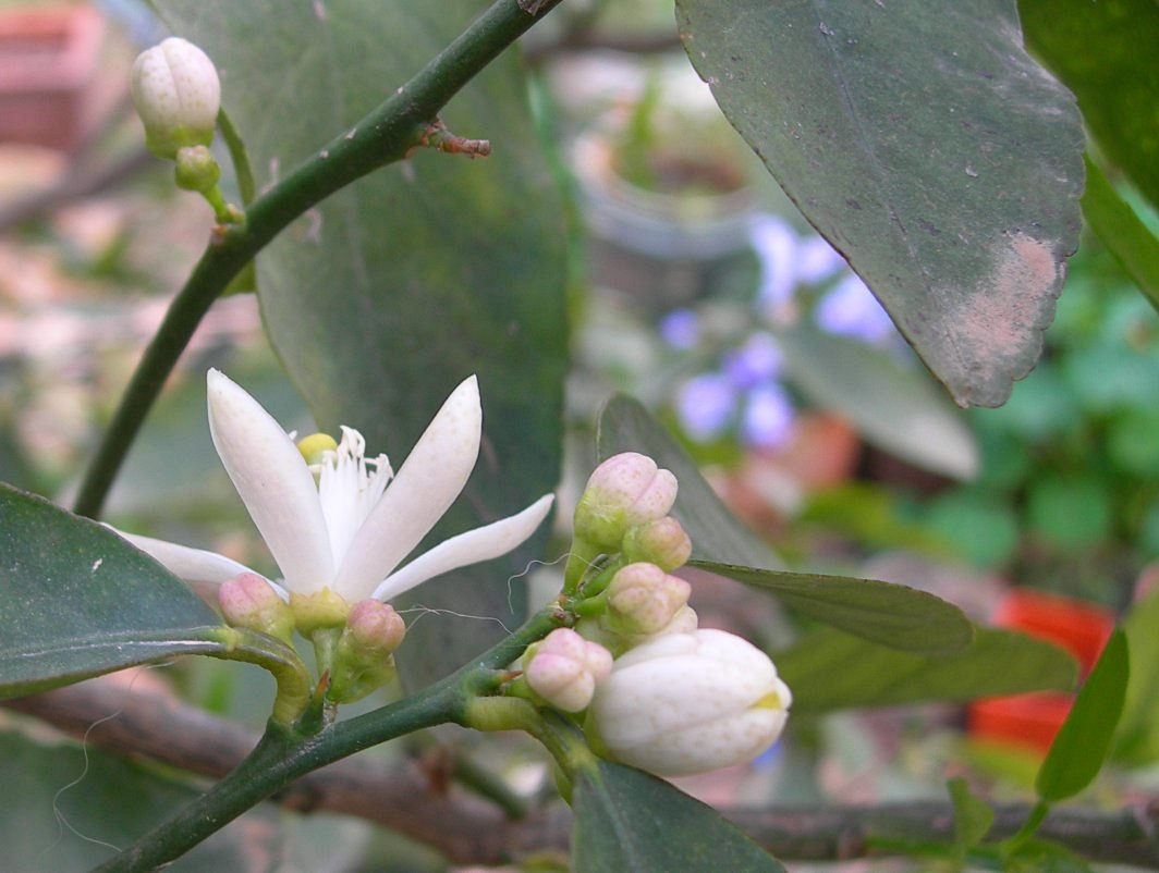 Lime (Citrus ×aurantiifolia).